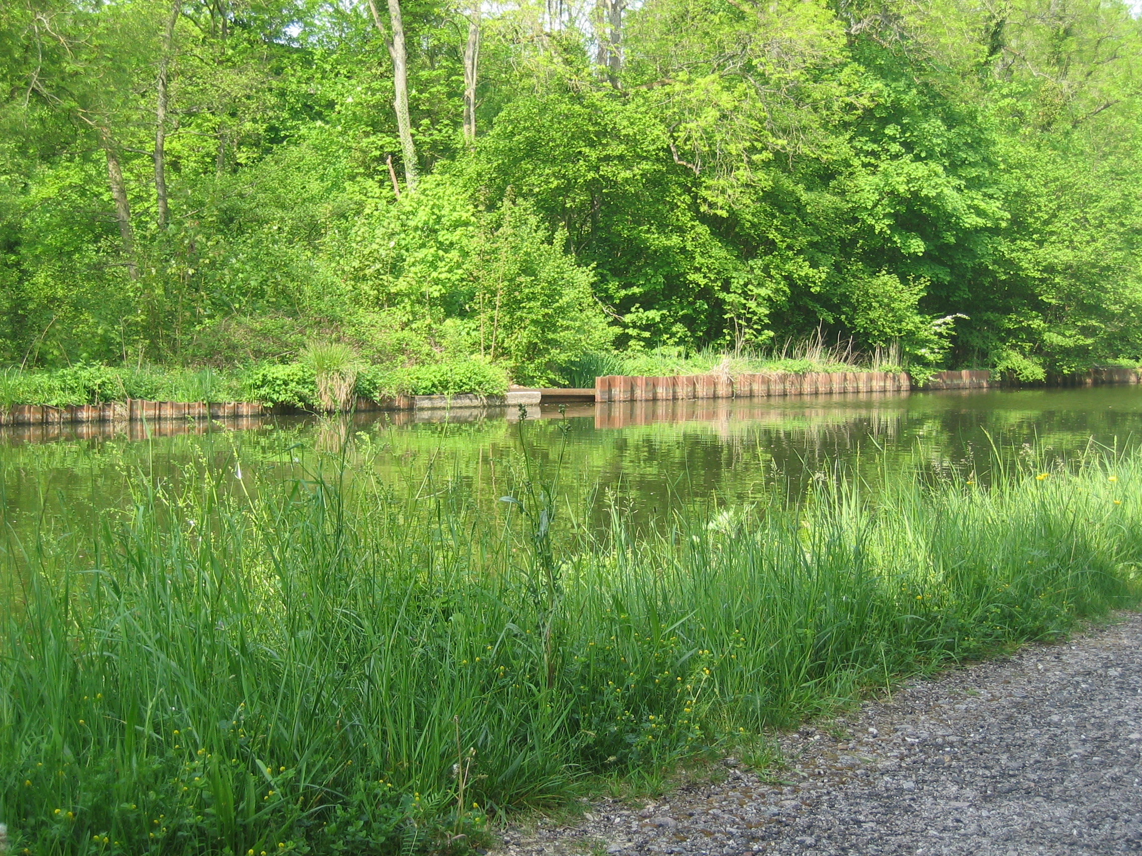 Ce qui servait de plage aux habitants des Charmottes dans les années 60. Le canal de l'est.